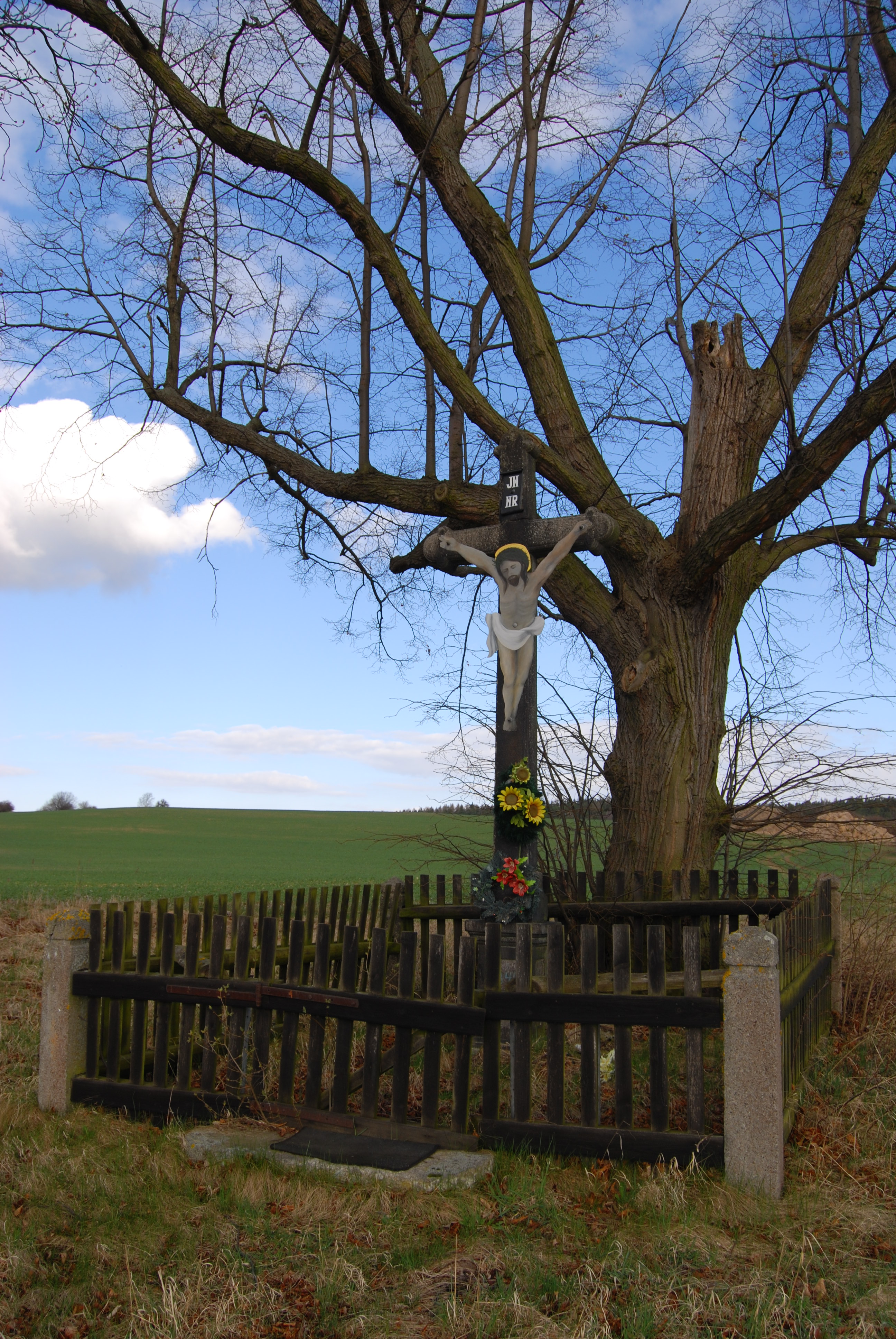 Kříž v ohrádce u komunikace z Kamýku na Příbram. Obec Jablonná se nachází v okrese Příbram, kraj Středočeský. Česká republika.